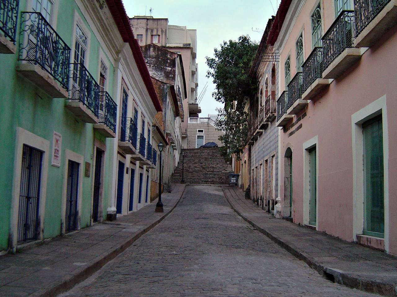 Reviver